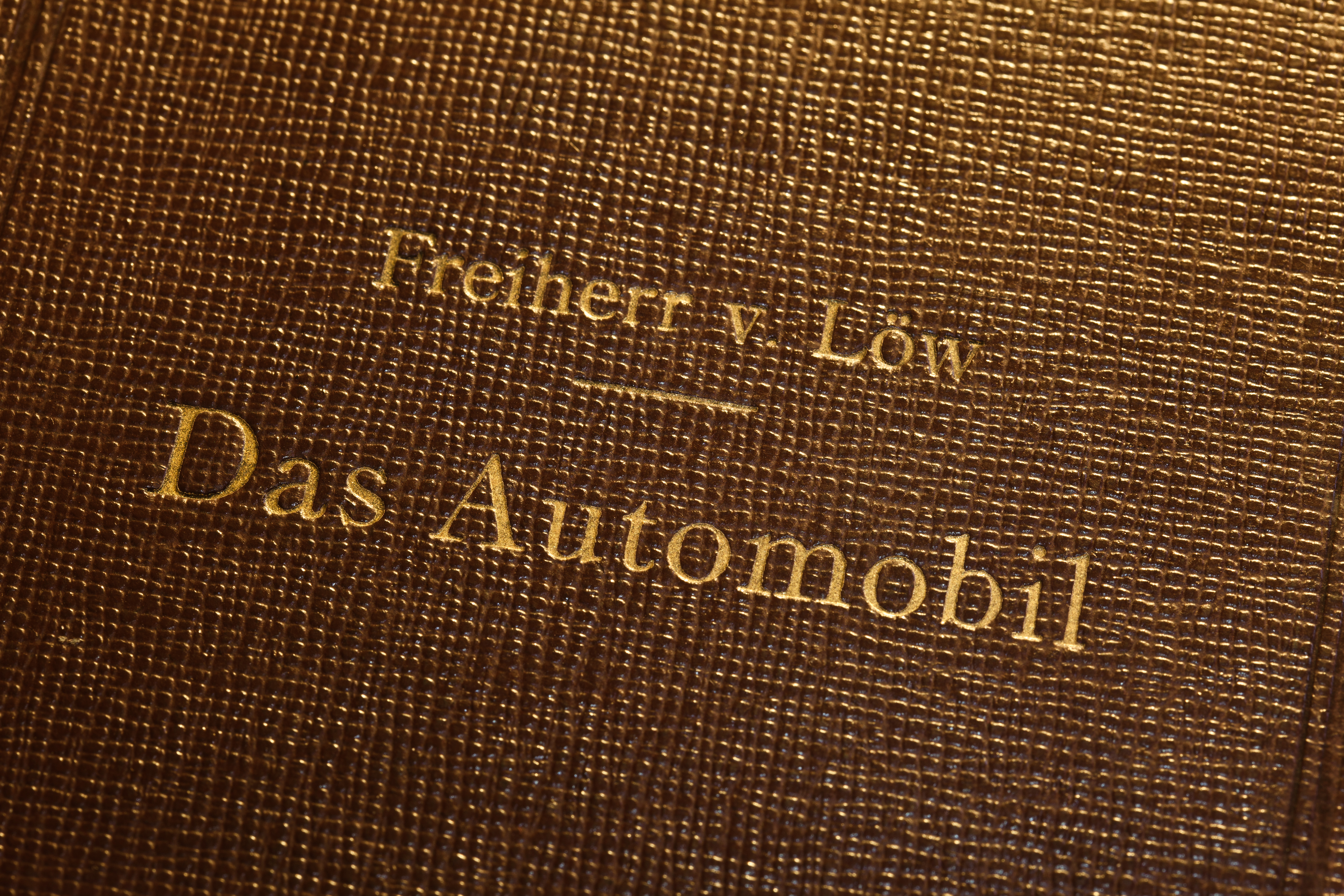 Detail aus dem Buchumschlag von "Das Automobil - sein Bau und sein Betrieb" von Ludwig Löw von und zu Steinfurth, 5. Auflage, 1924, C. W. Kreidel's Verlag Berlin